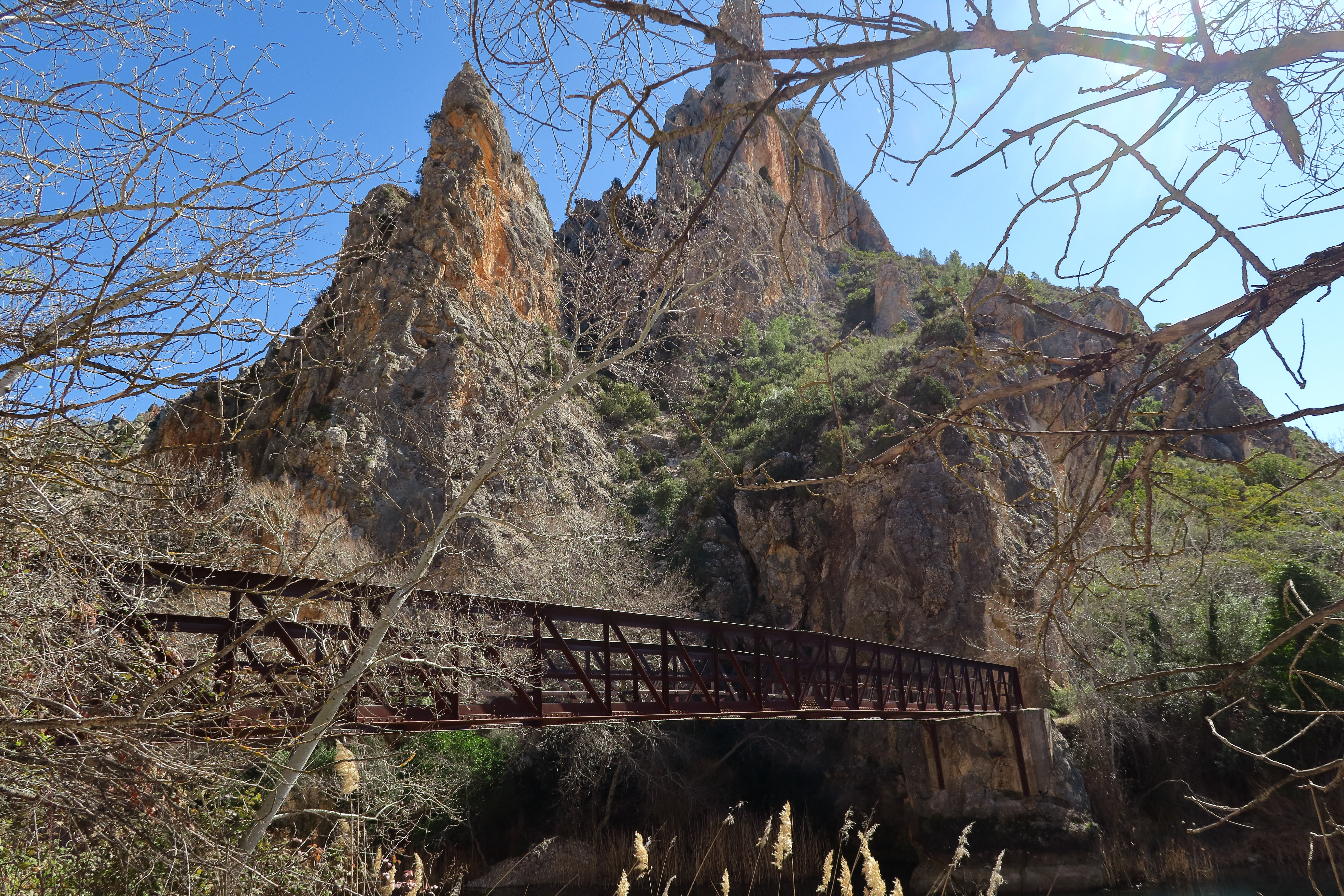 Hoces del Cabriel, antiguo puente sobre río Cabriel junto a Cuchilleras de Contreras